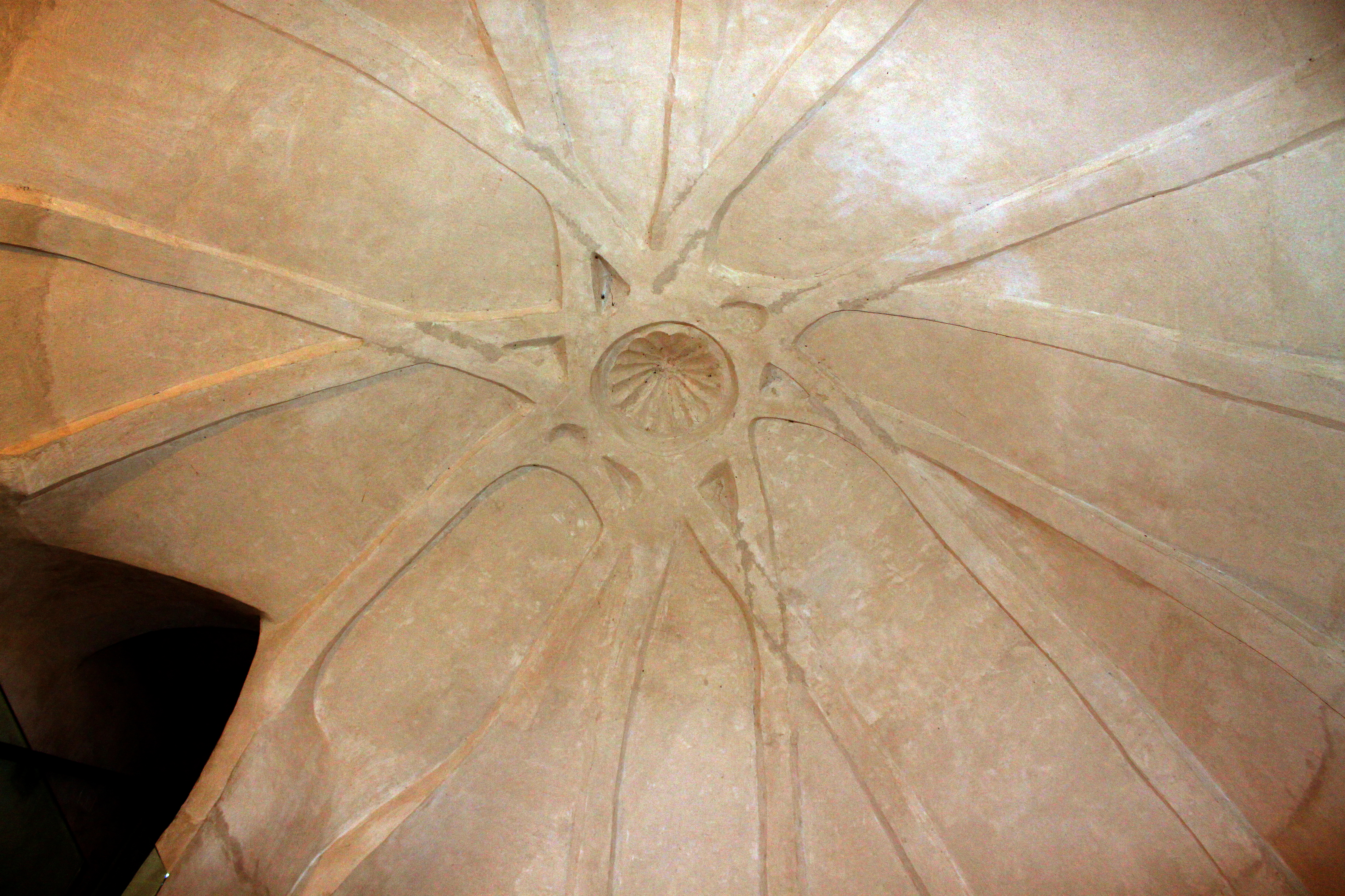 Castillo de Biar cúpula nervada almohade la primera planta de la torre del homenaje. Biar, provincia de Alicante, España.